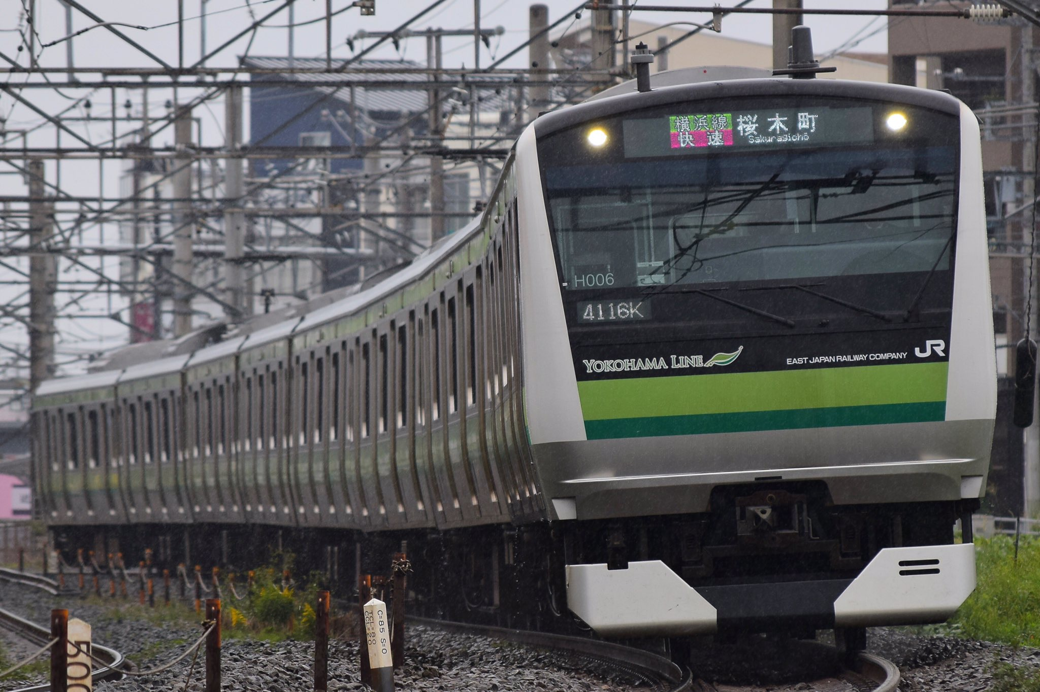 JR横浜線八王子-片倉 4116K 快速桜木町